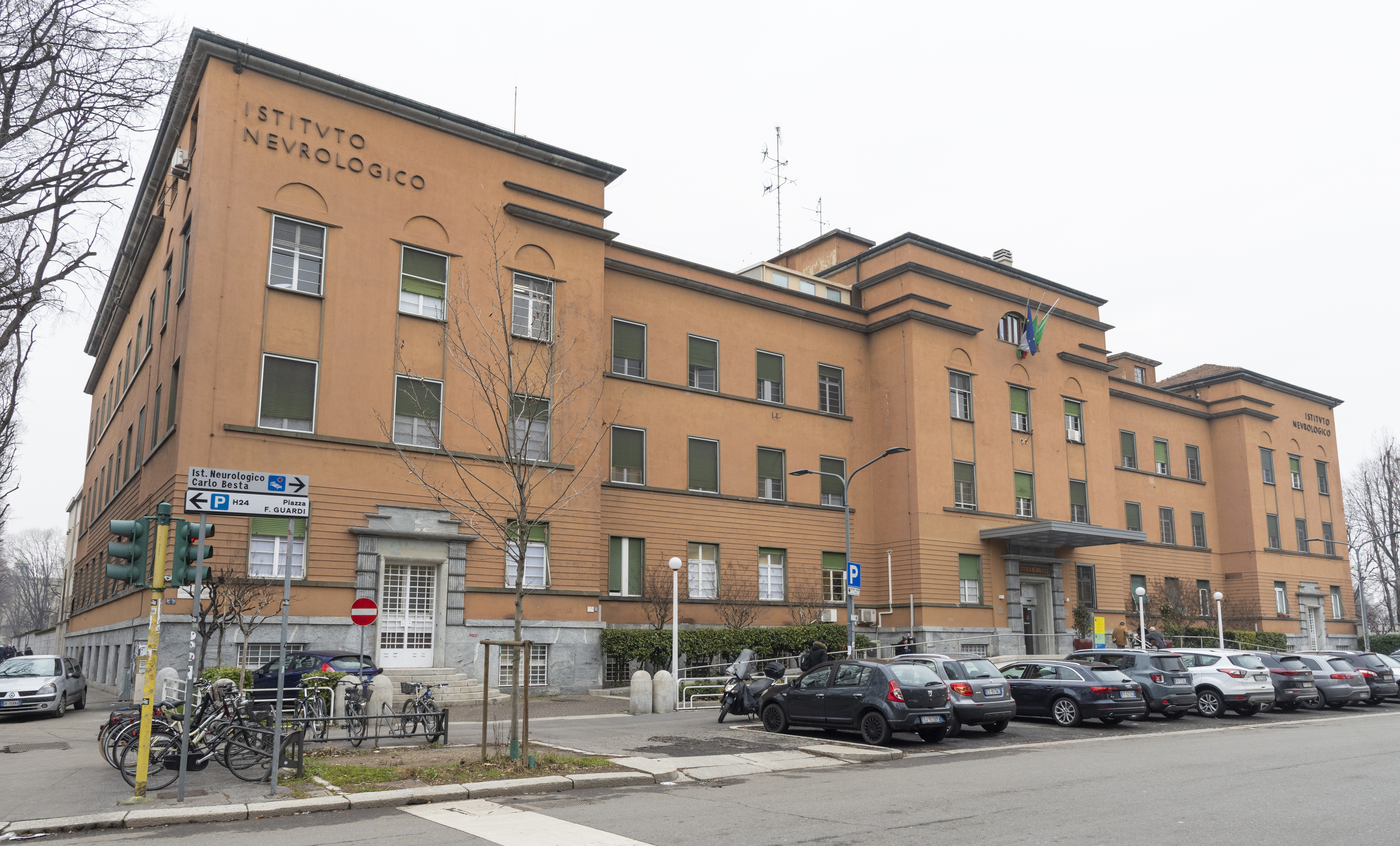 Carlo Besta Neurological Institute